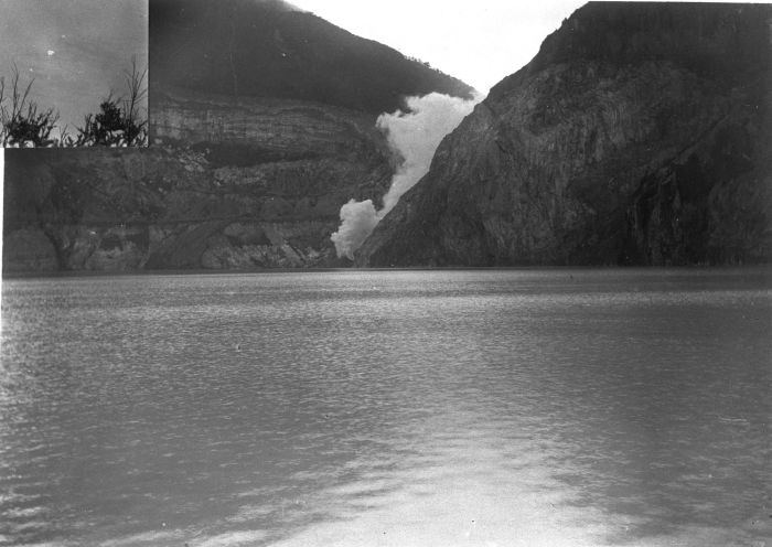 Foto. Solfataren aan de oostkant van het kratermeer van Kawah Idjen op Oost-Java